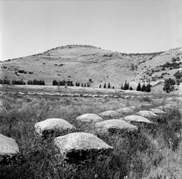 מחסום רג'אר, 1997